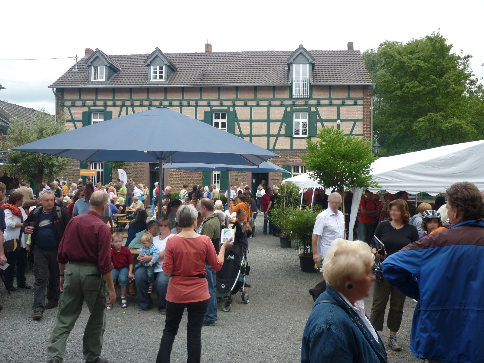 Gymnicher Mühle, Erftstadt-Gymnich, Eröffnung des Informationszentrums am Deutschen Mühlentag 2011, Pfingsmontag, 13. Juni 2011